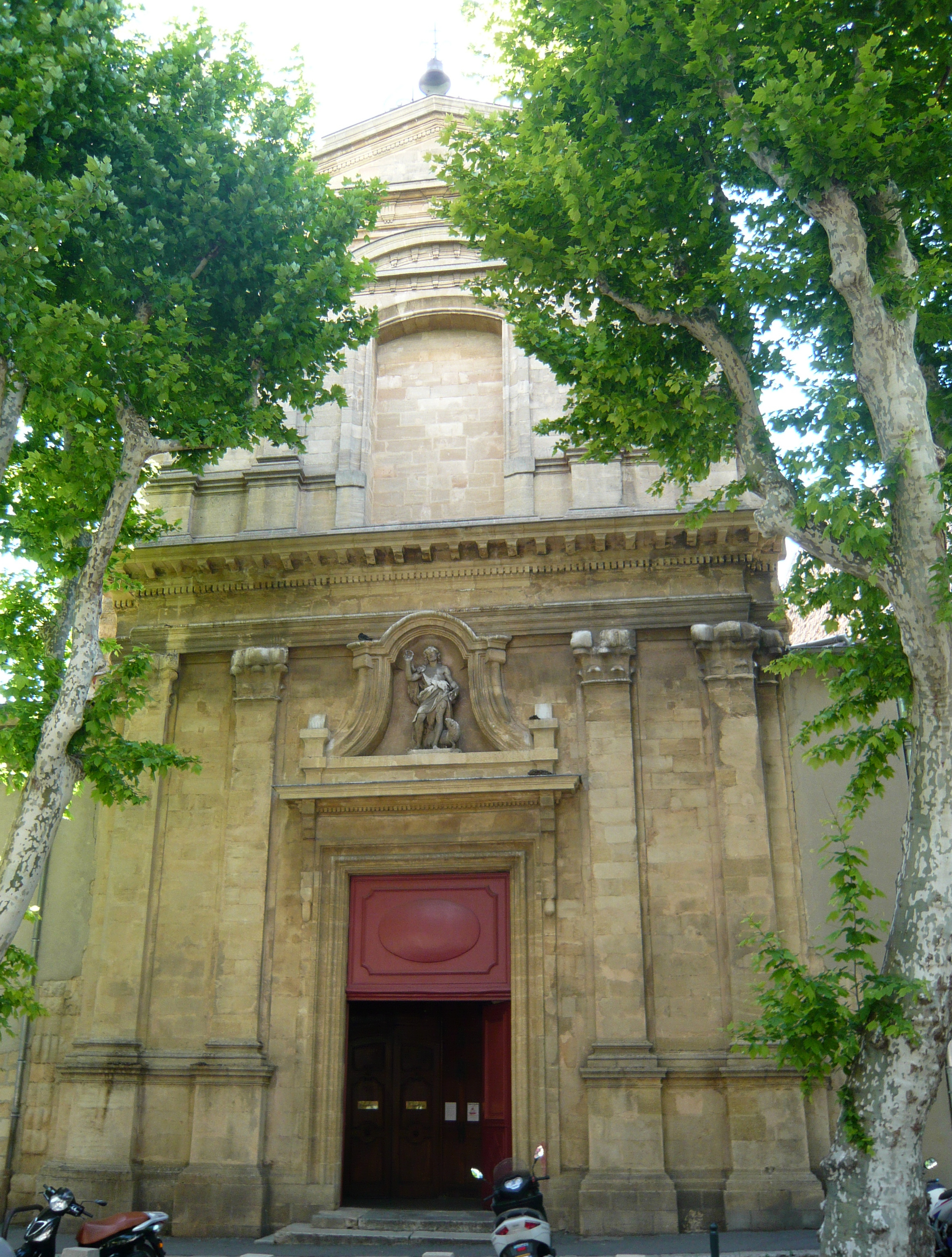 Église Saint-Jean-Baptiste du Faubourg, 34 cours Sextius, Aix-en-Provence, France (classé, 1983). .